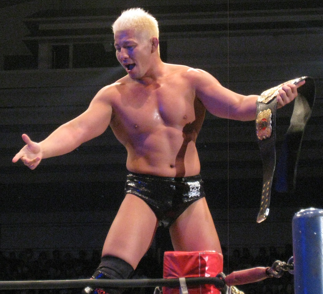 2014年6月21日 大阪府立体育会館 「DOMINION6.21」 高橋裕二郎